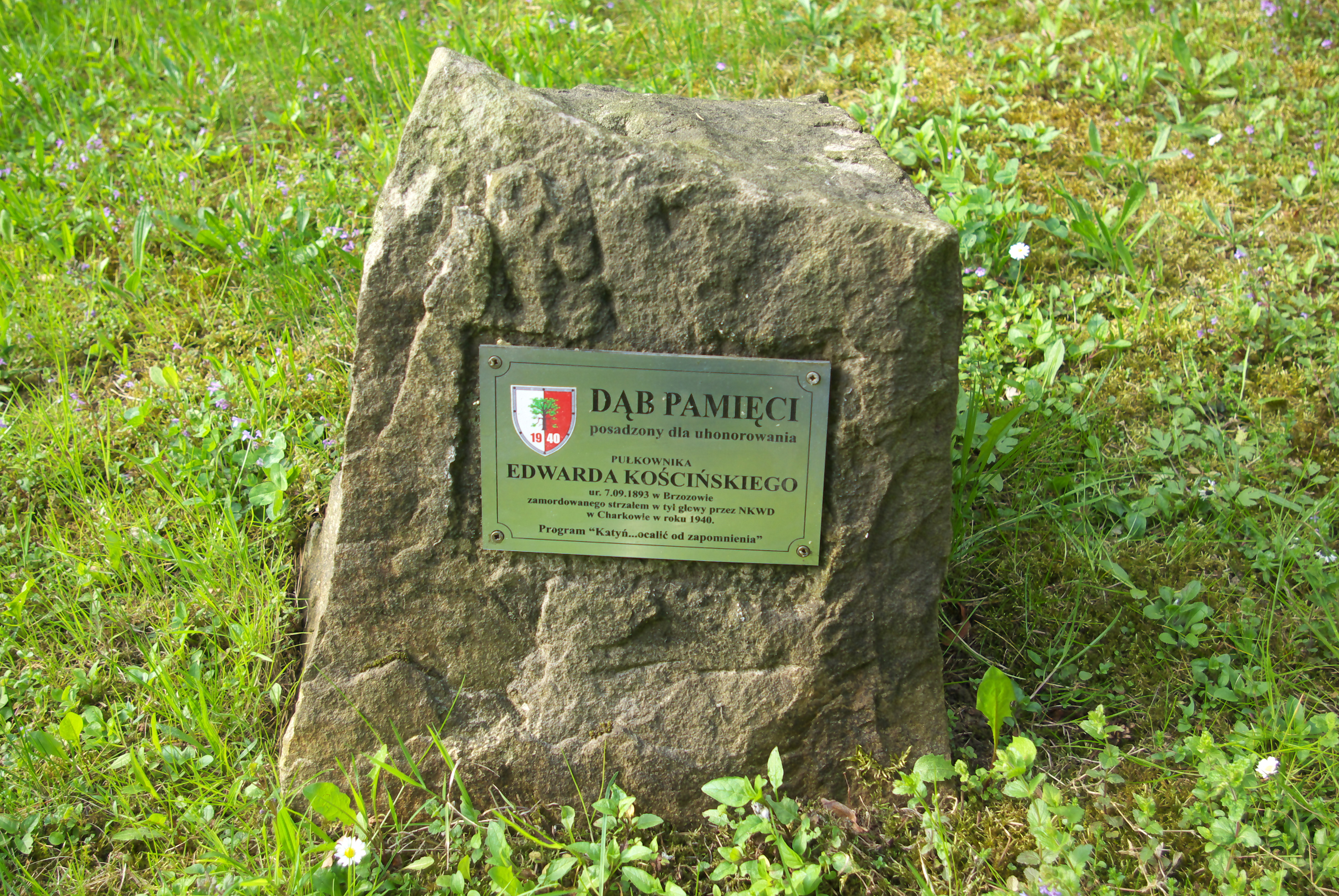 Dąb Pamięci honorujący Edwarda Kościńskiego w Brzozowie (I Liceum Ogólnokształcące im. Króla Kazimierza Wielkiego w Brzozowie, ulica Waleriana Pańki 2).